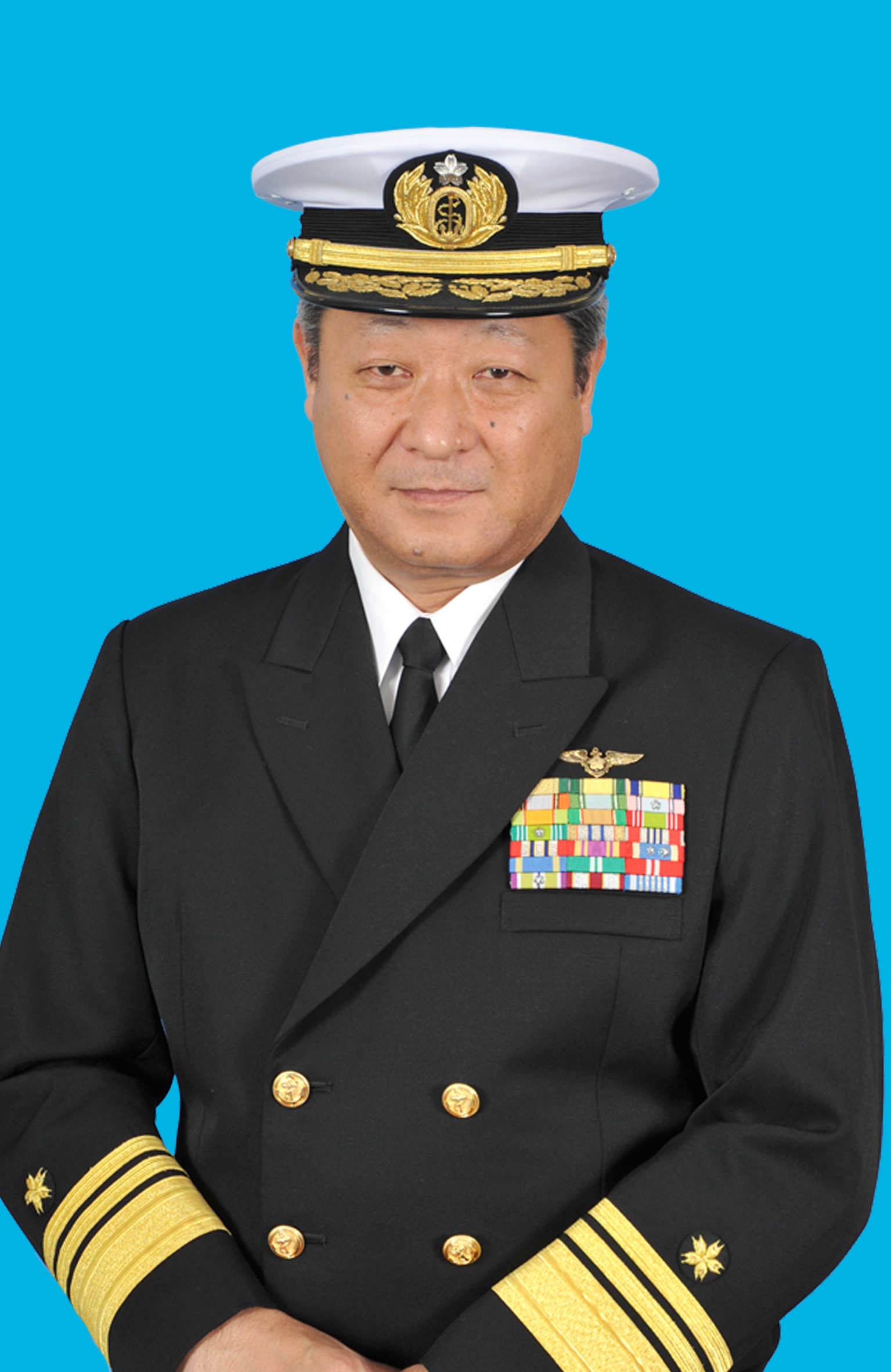 海上自衛隊杉本孝幸海将